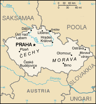 Tšehhi kaart